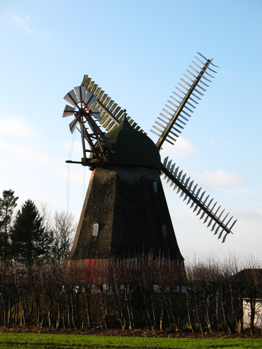 Uggerslev Mølle, Petersmindevej 12, Otterup Eget foto, Noorse Licentie: CC-BY-SA-3.0 Forminsket versjon for Wikipedia